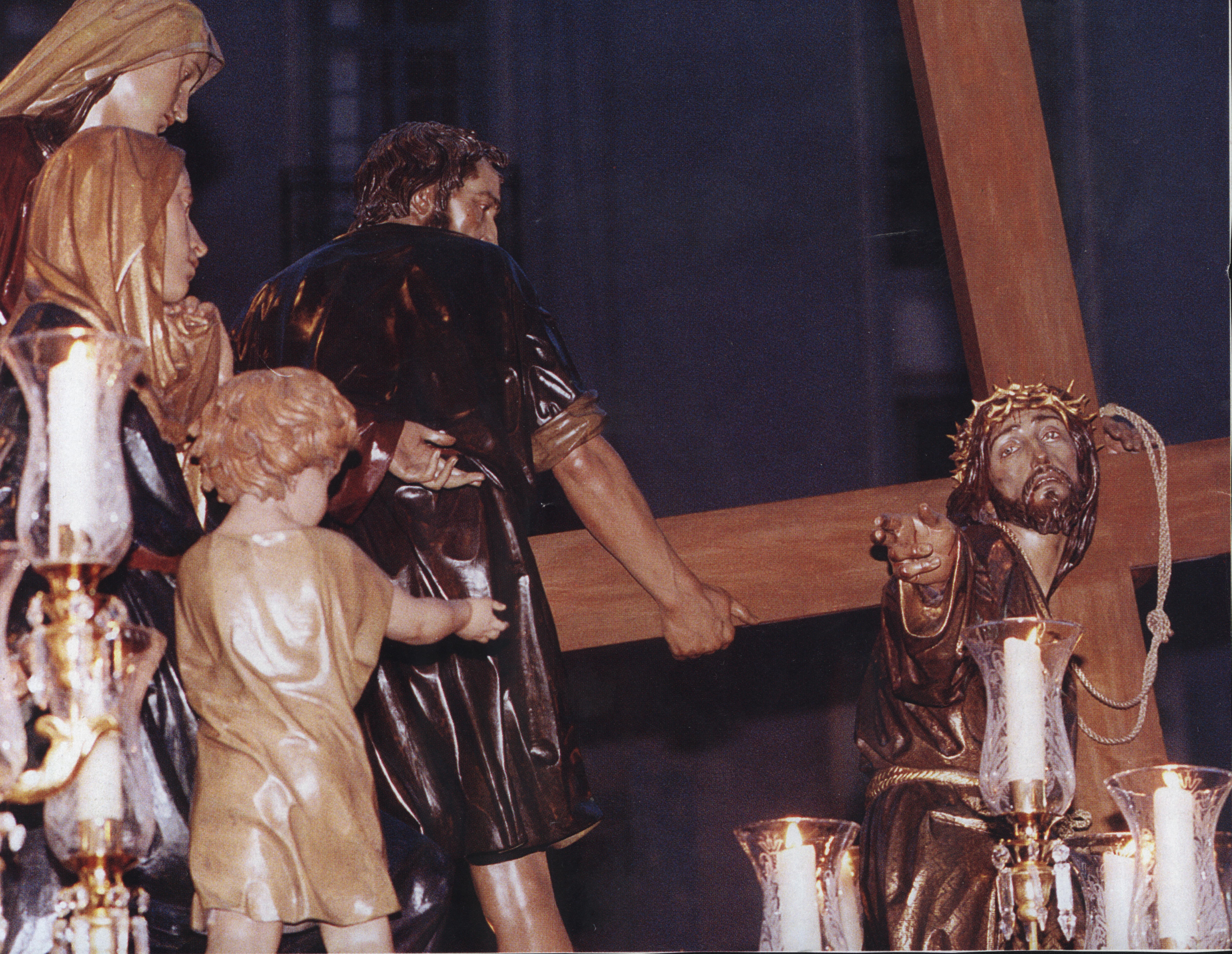 HIJAS DE JERUSALEM JUAN GONZALEZ MORENO PROCESION LOS COLORAOS. MURCIA